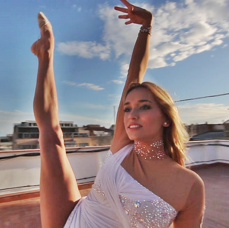 Júlia Usón en el cortometraje Júlia de 2013.